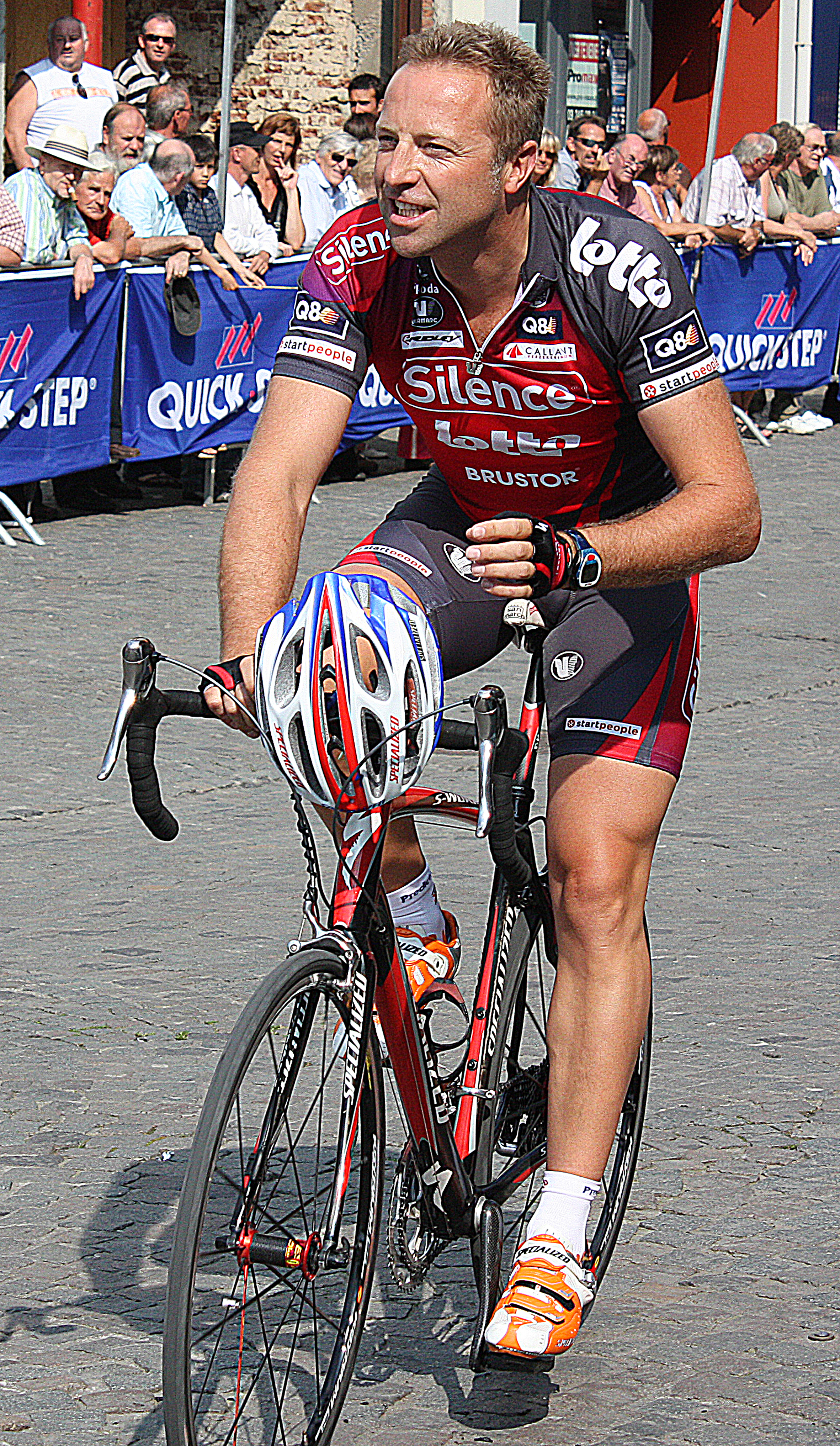 Jo Planckaert Criterium Aalst 2008